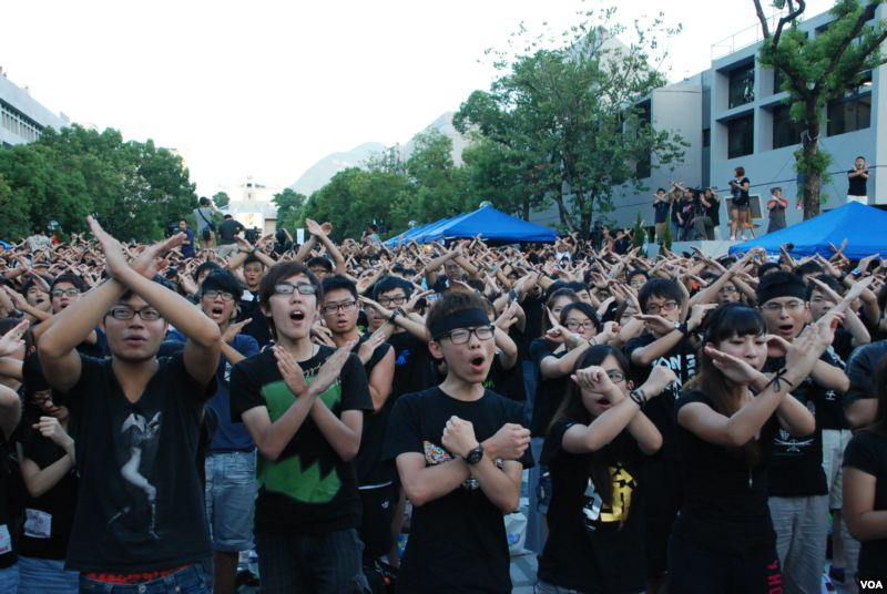 Hong Kong university students boycott classes against National Education